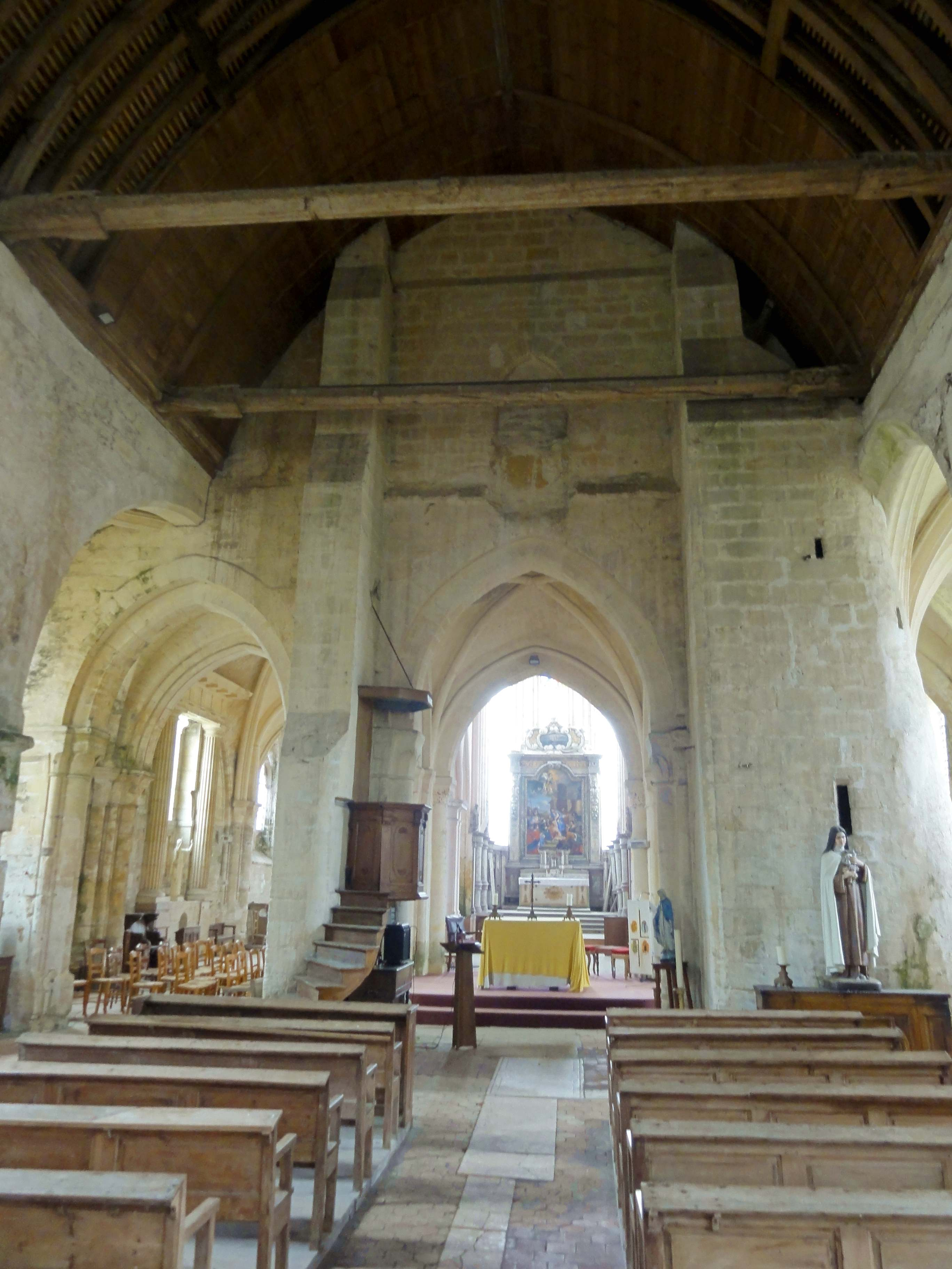 Intérieur de l'église (voir titre).